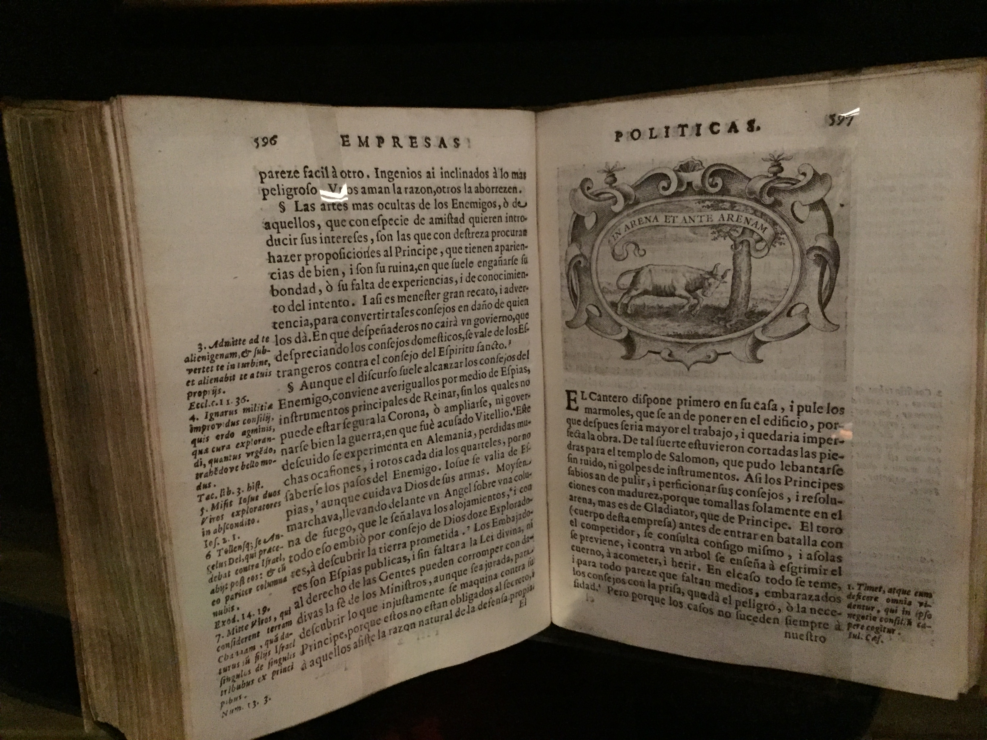 Libro de filosofía política titulado Idea de un príncipe cristiano, publicado en 1643 por el diplomático español Diego de Saavedra Fajardo Expuesto en la Casa de la Historia Europea en Bruselas.